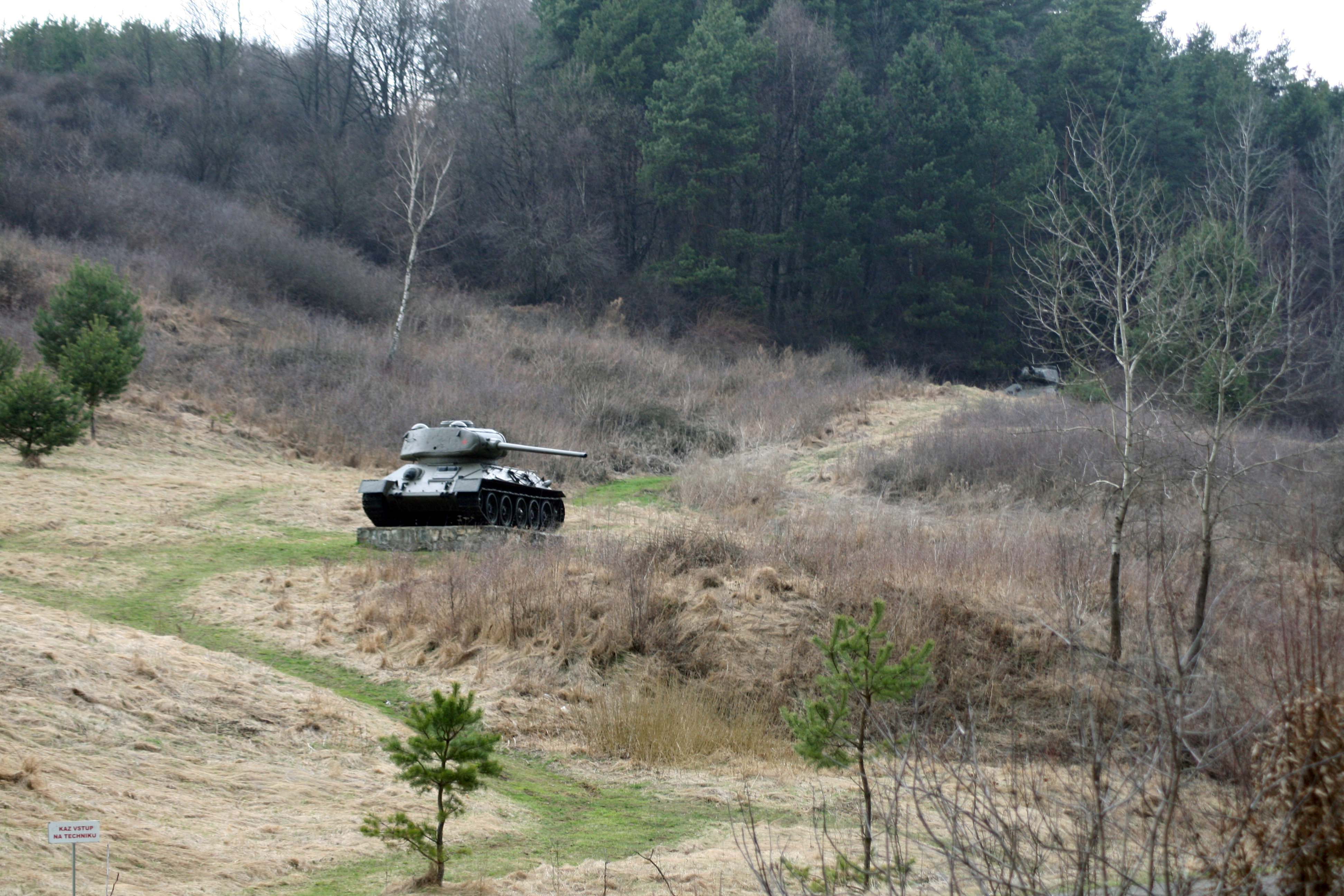 Imitácia bojového nasadenia tankovej jednotky v období Karpatsko-duklianskej operácie